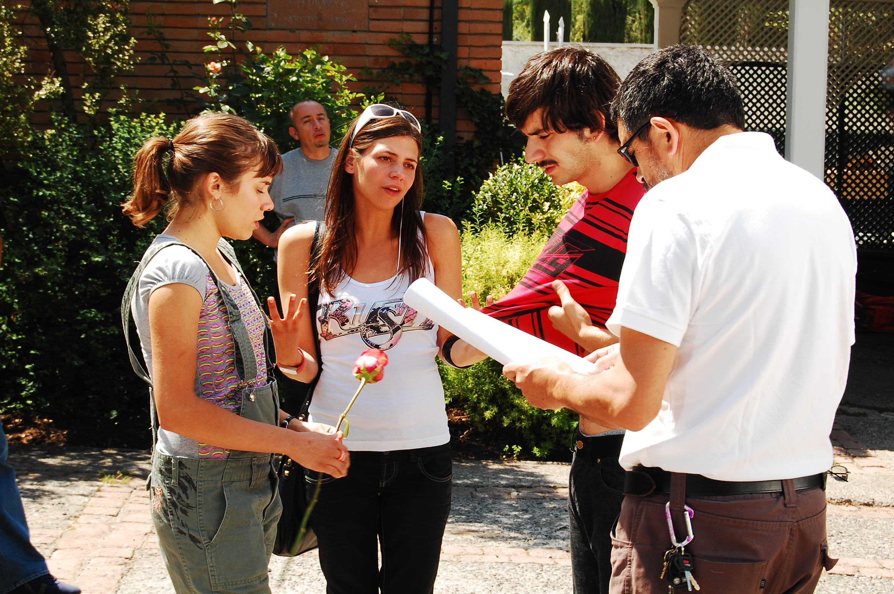 Ensayo de la telenovela chilena Lola con María Gracia Omegna (como Meche), Fabiola Matte (como Natalia) y Gonzalo Olave (como Booggie).